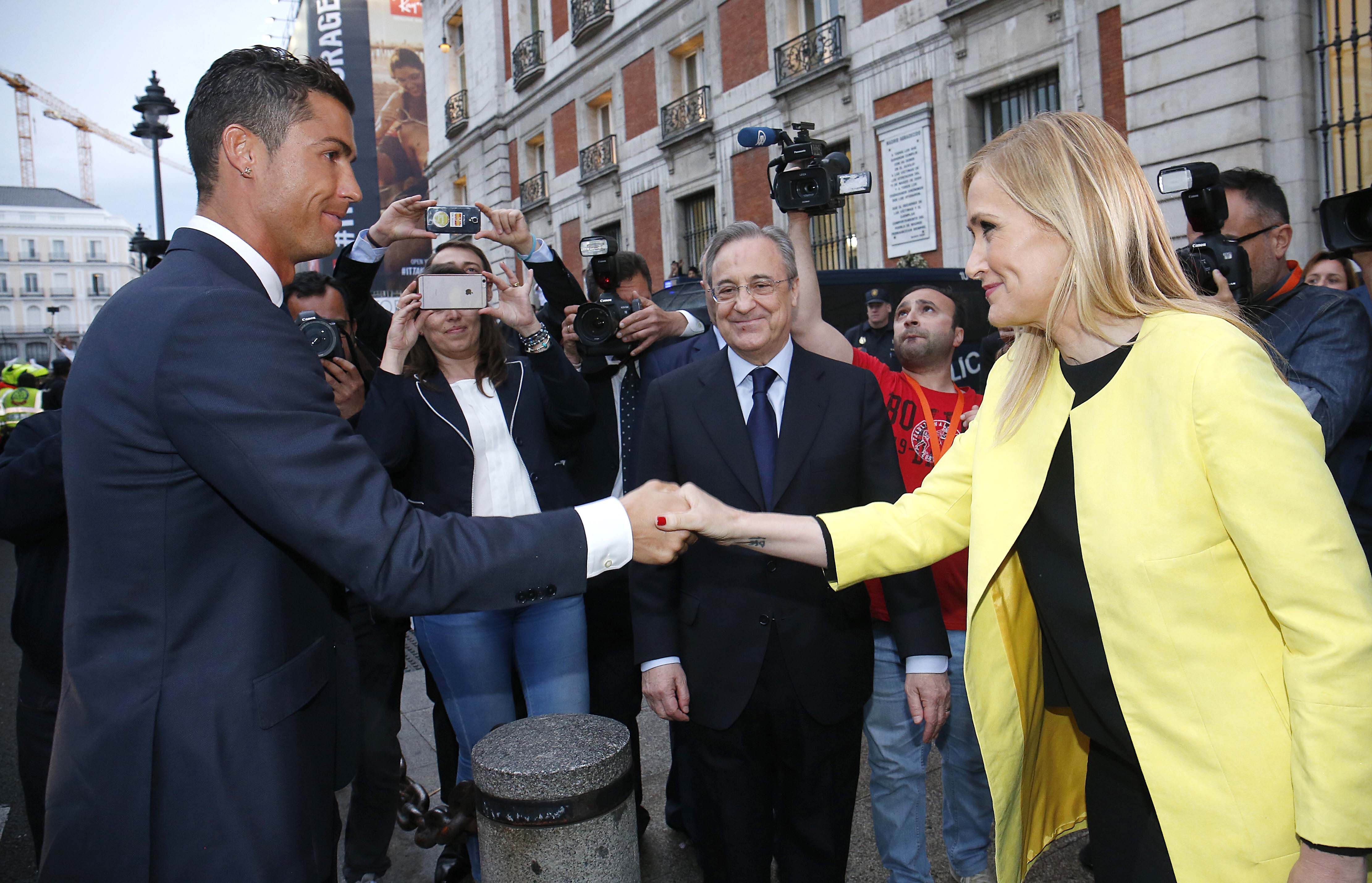 La undécima ya está en la Puerta del Sol. Un gran victoria del Real Madrid, que tuvo enfrente un gran rival, el Atlético de Madrid. Enhorabuena a los dos, enhorabuena Madrid! 🏆⚽